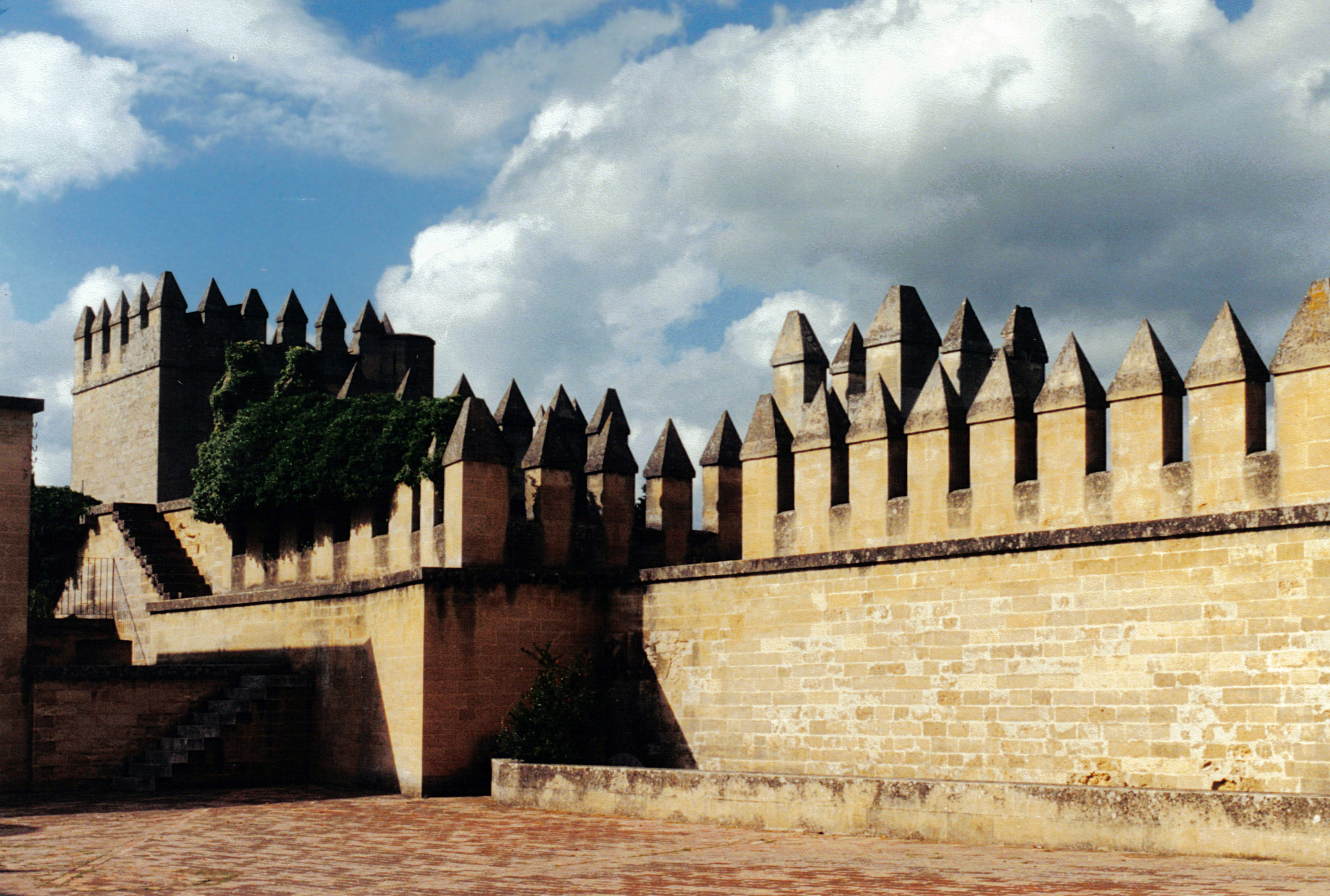 Almodovar del Rio : forteresse almohade